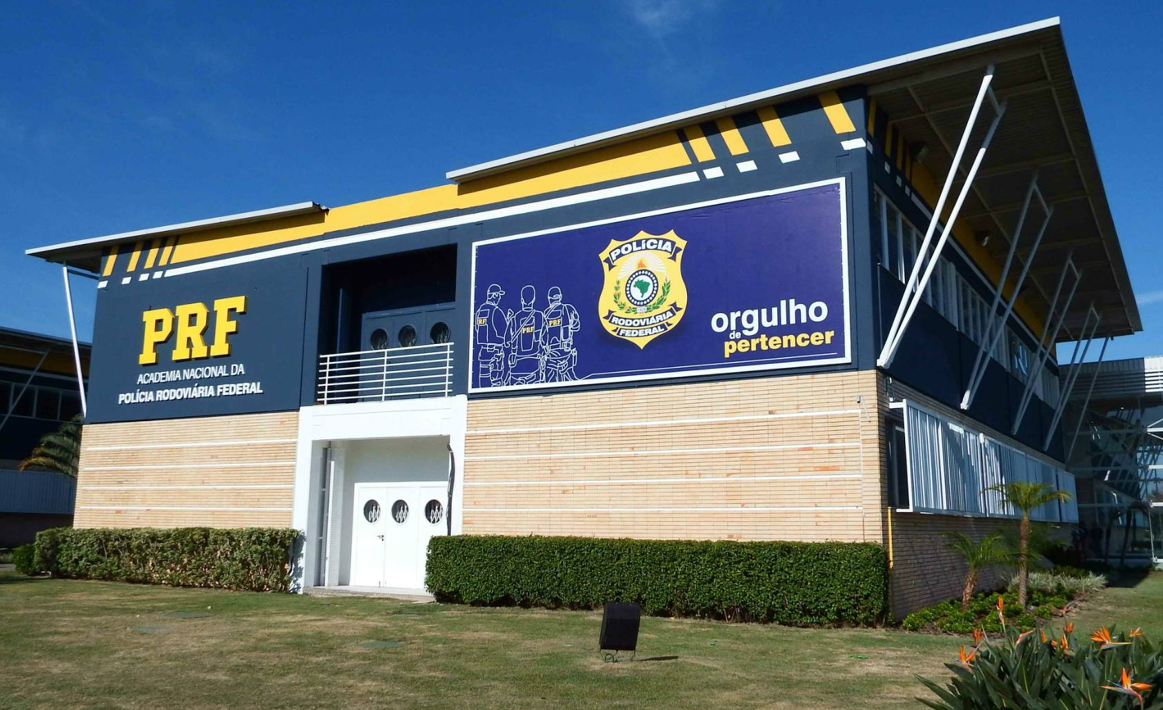 ANPRF